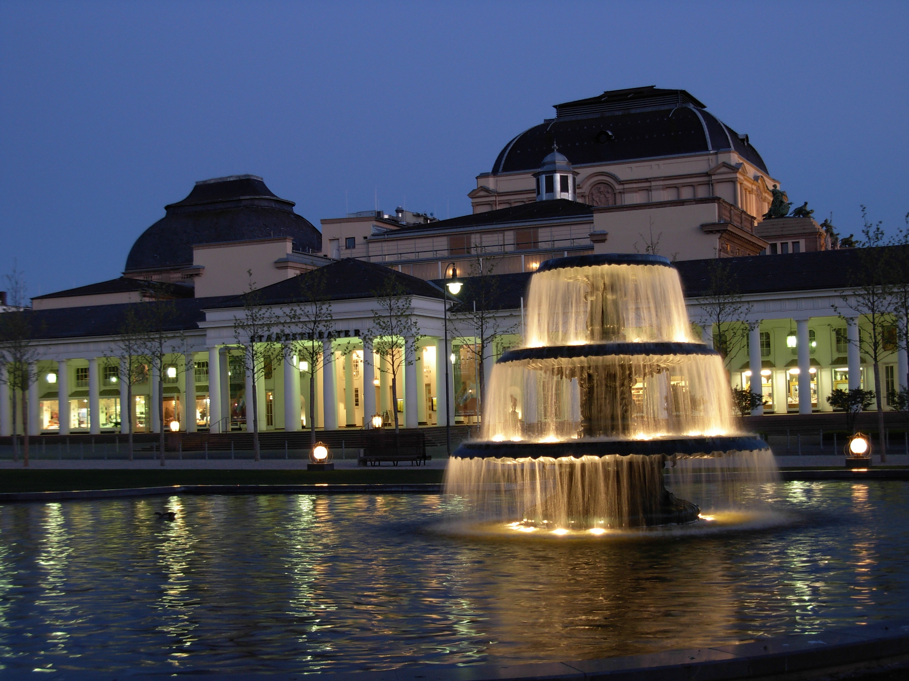 Hessisches Staatstheater Wiesbaden mit Theaterkolonaden und Kaskadenbrunnen des Bowling Green